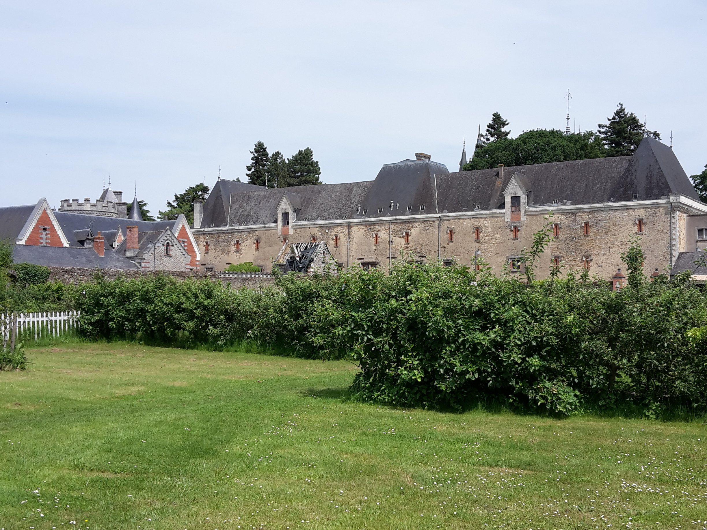 Potager du château de Challain, Maine-et-Loire, France.